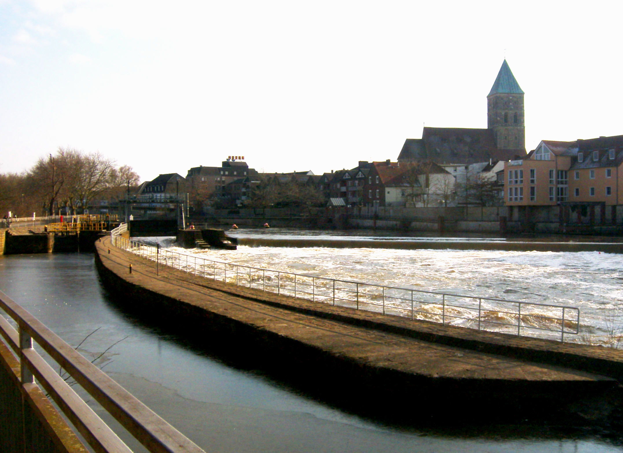 Emsseitenkanal, Schleuse, Emswehr, Stadtkirche This image shows a heritage building in Germany, located in the North Rhine-Westphalian city Rheine (no. 102).